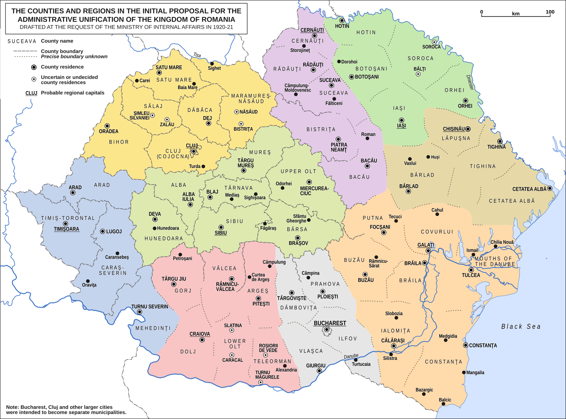 Propunerea de împărţire administrativă a României în judeţe şi regiuni facută în 1920 de Comisia pentru Studiul unei Noi Arondari a Judeţelor condusă de Simion Mehedinţi.